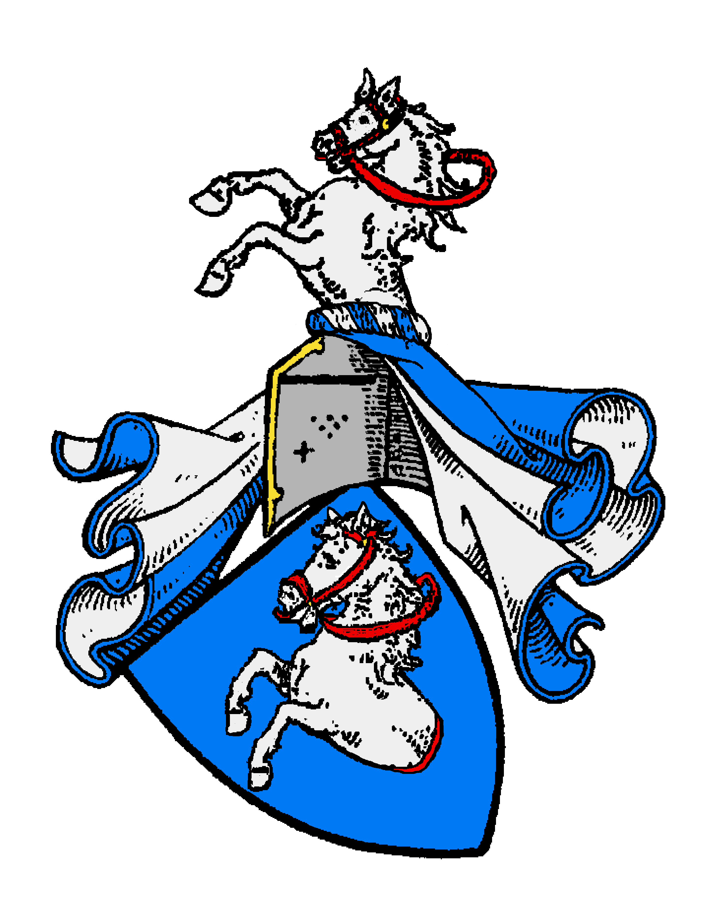 Stammwappen der von Malowetz (der Hauptlinie Malovec von Chejnov und Winterberg)